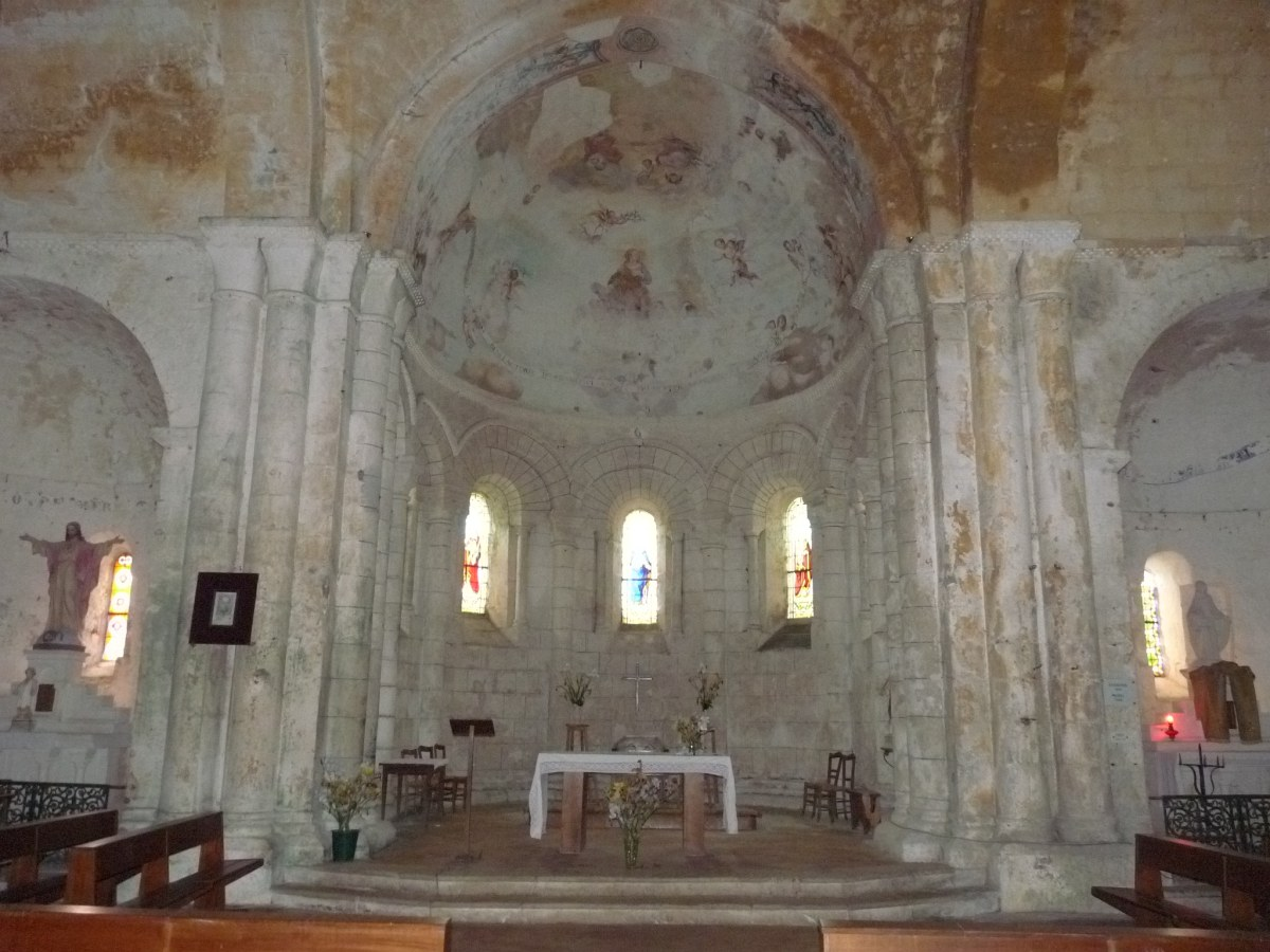 Intérieur de l'église de Charmant, Charente, France